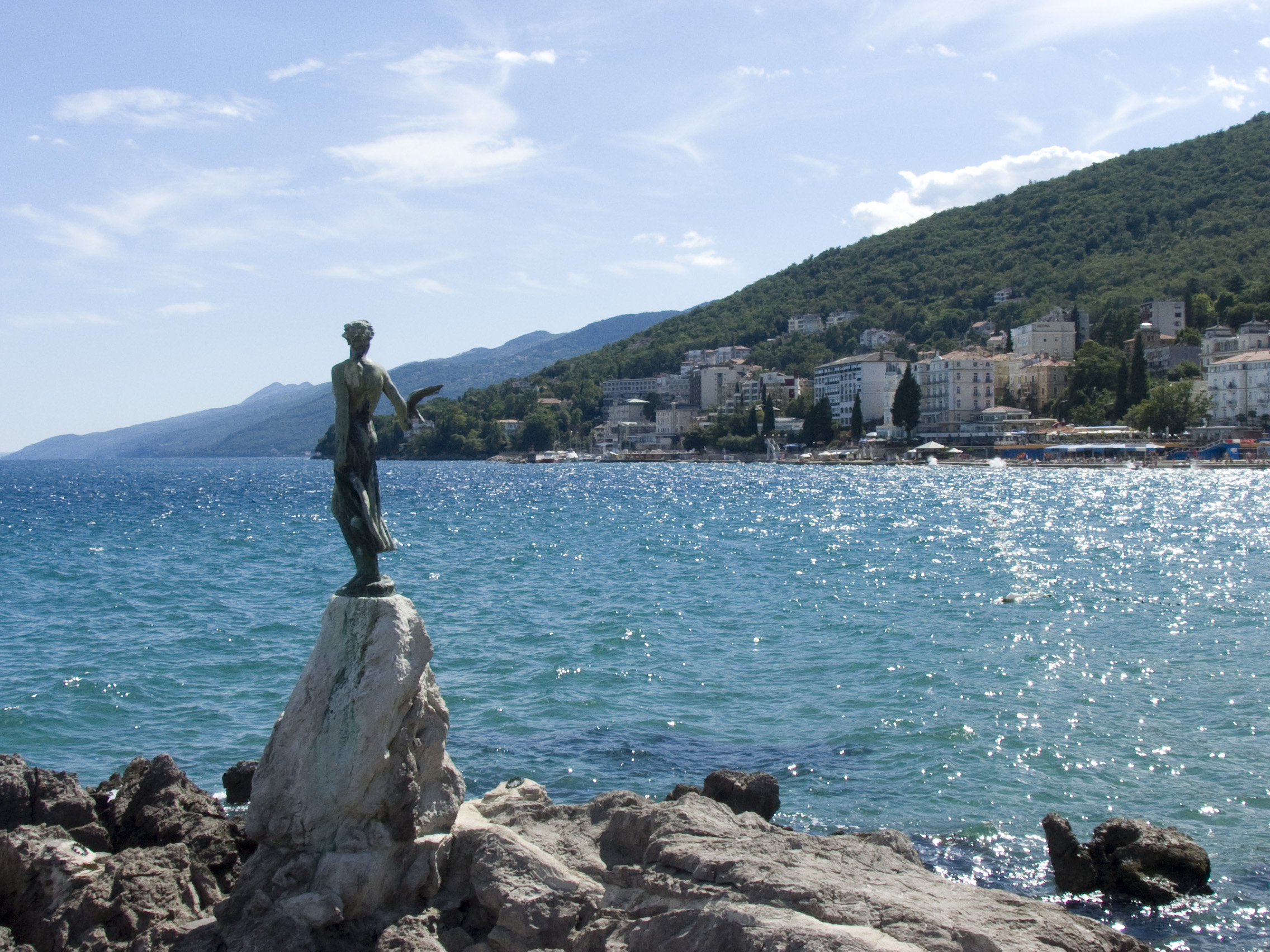 Wahrzeichen von Opatija